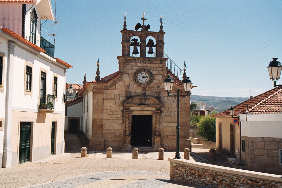 Igreja Matriz de Santa Comba da Vilariça. Tirada pelo submissor.